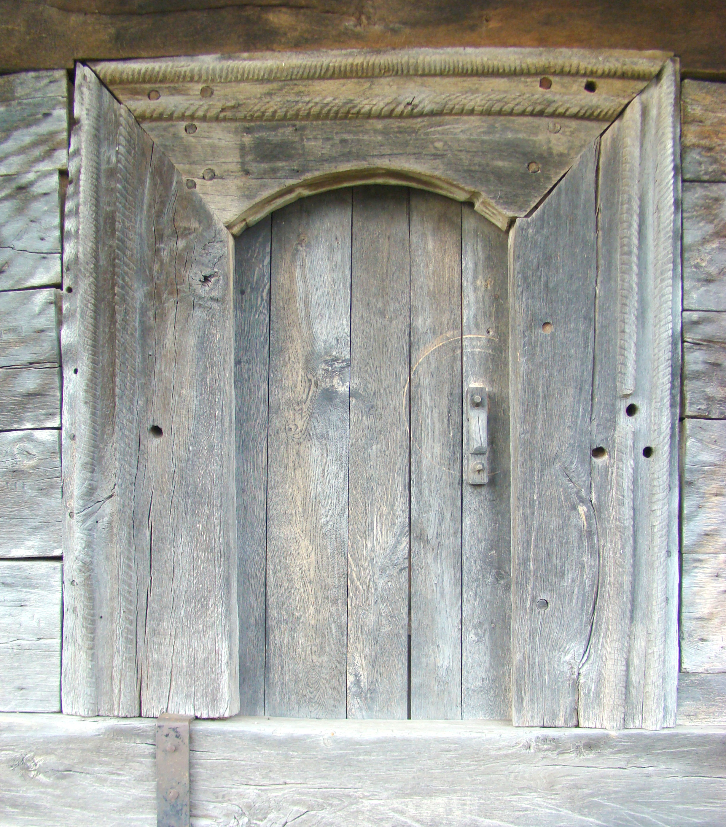 Biserica de lemn „Sfinţii Arhangheli Mihail și Gavriil" din Poarta Sălajului, comuna Românaşi, judeţul Sălaj